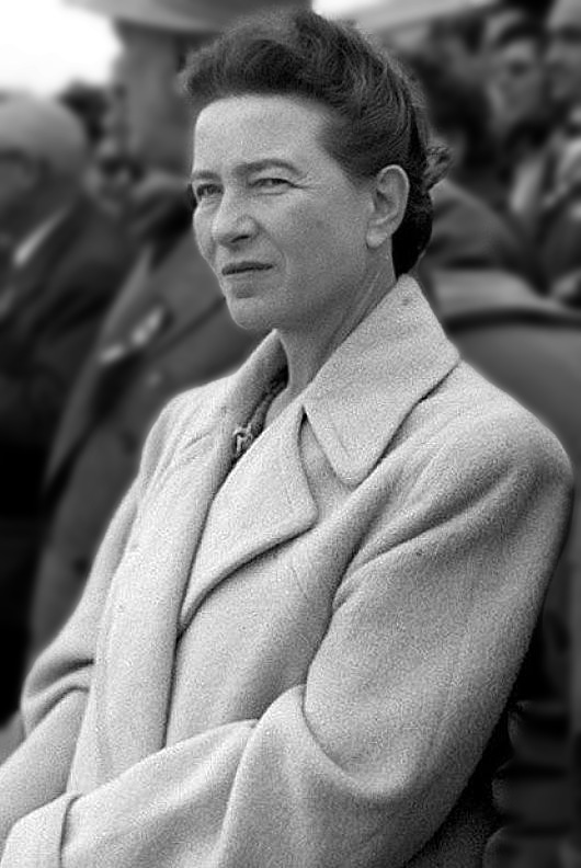 Simone de Beauvoir en Beijing el 1 de octubre de 1955 en la plaza Tiananmen.